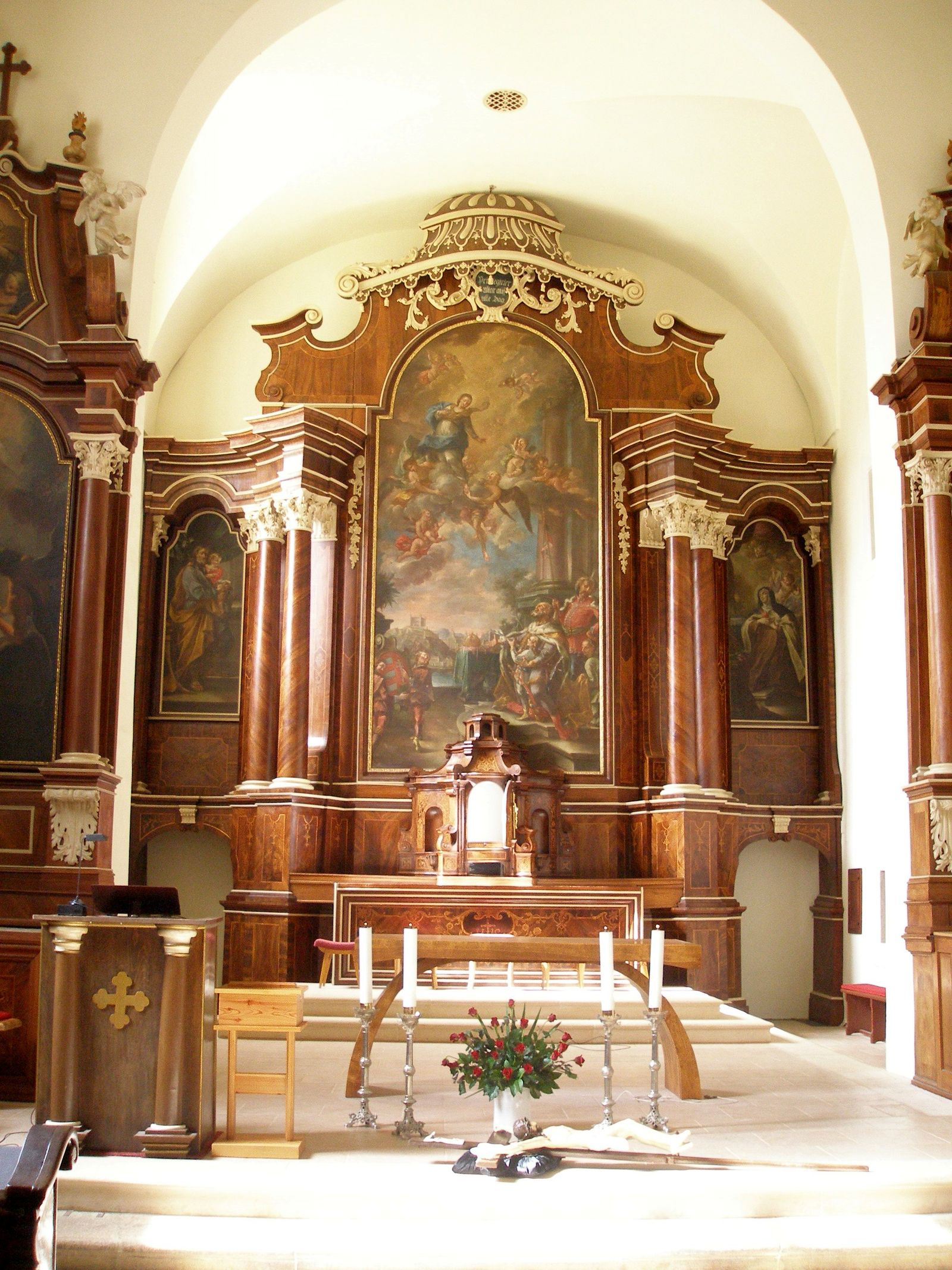 Kapucínsky kostol interiér